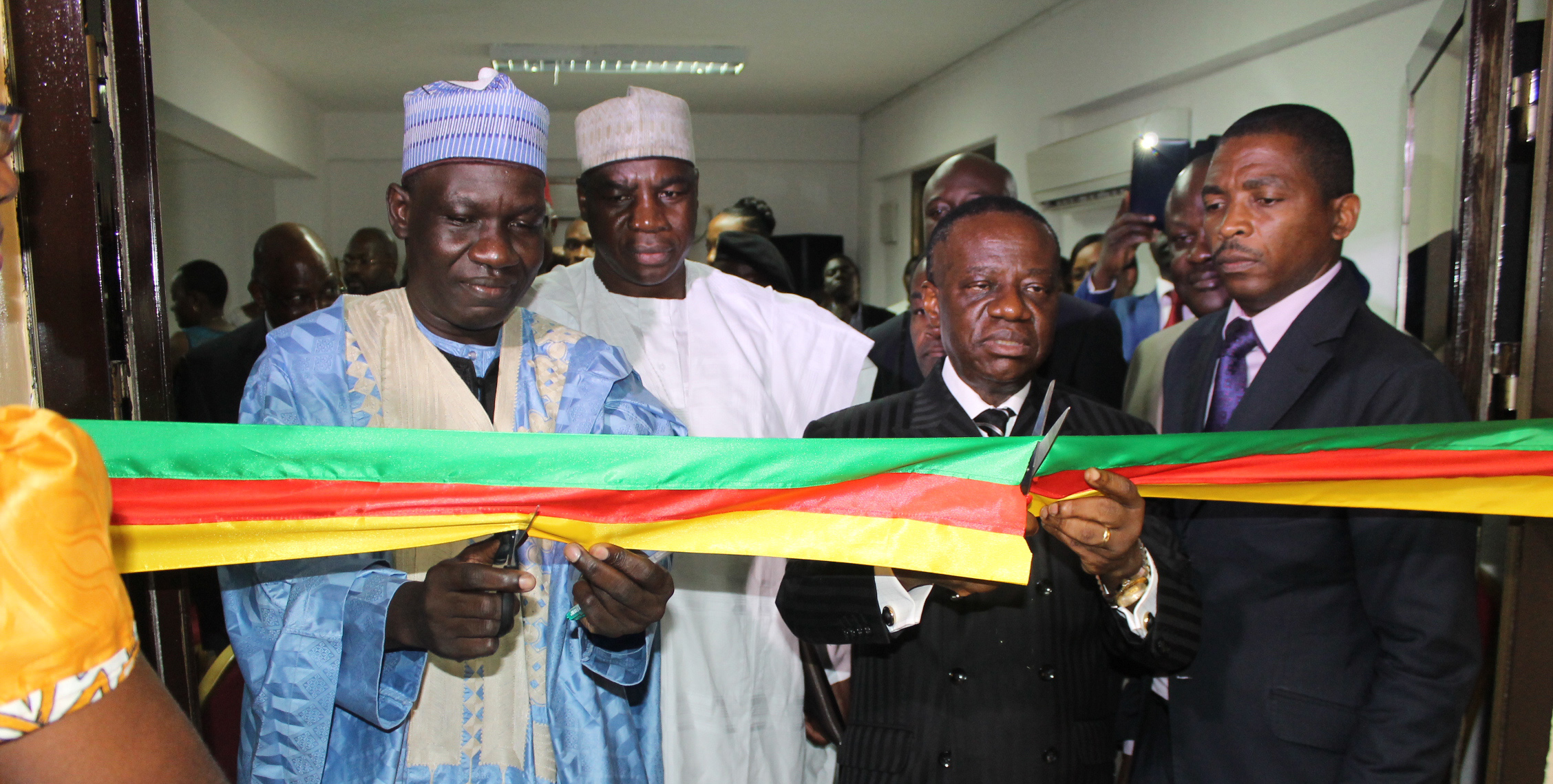 Lancement officiel du Programme Supérieur de Spécialisation en Finances Publiques par le Ministre des Finances (Alamine Ousmane Mey) et le Ministre de l’Enseignement Supérieur (Jacques Fame Ndongo) du Cameroun